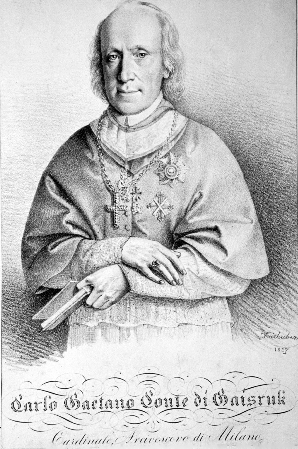 Karl Kajetan Graf Gaisruk (1769-1846), Kardinal, ERzbischof von Mailand. Lithographie von Josef Kriehuber, 1827